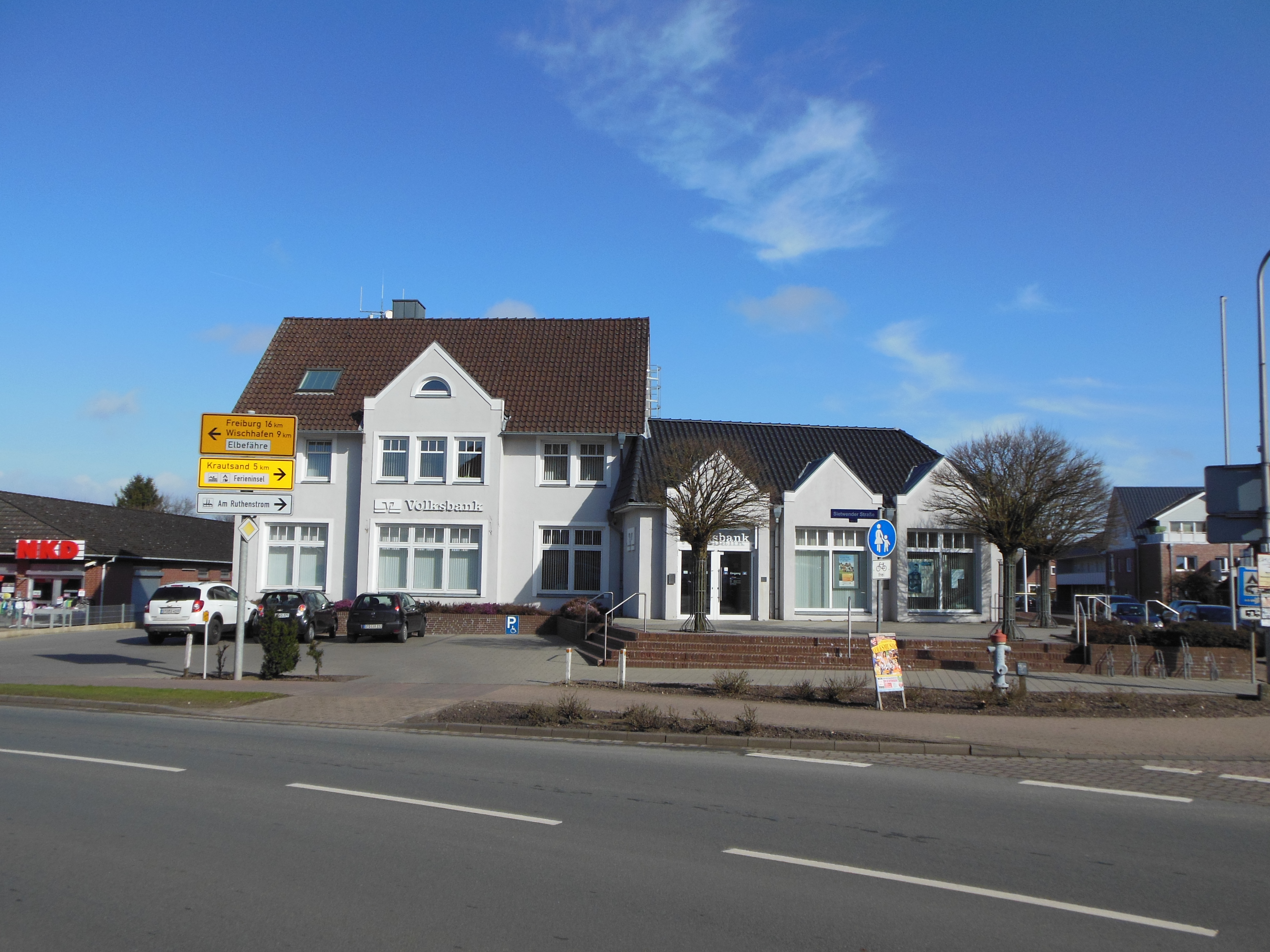 Hauptstelle der Volksbank Kehdingen, Zweigniederlassung der Ostfriesische Volksbank eG, Sietwender Straße 2, 21706 Drochtersen, Deutschland